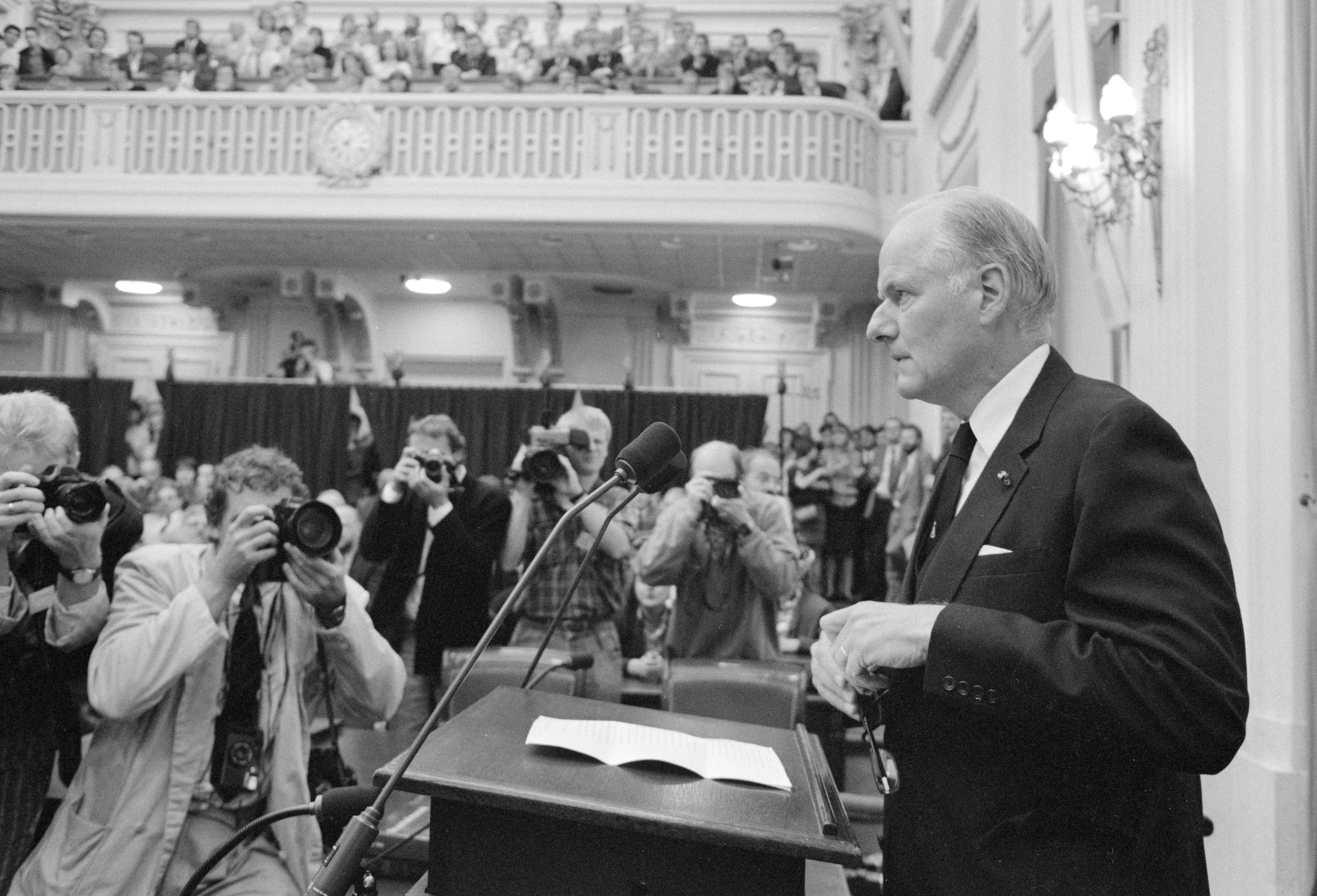 Nationaal Archief Beschrijving: Minister van Defensie Van Eekelen afgetreden; Van Eekelen gaat verklaring afleggen Datum: 6 september 1988 Bestanddeelnummer NL-HaNA_Anefo_934-3067 Vervaardiger: Bogaerts, Rob / Anefo URL: Voor meer informatie over het Nationaal Archief: Voor meer foto's uit deze en andere collecties, bezoek onze Beeldbank:, U kunt ons helpen onze kennis van de fotocollecties te verrijken door tags en commentaren toe te voegen. Herkent u mensen of locaties of heeft u een bijzonder verhaal te vertellen bij één van de foto's, laat dan een reactie achter (als u ingelogd bent bij Flickr) of stuur een mailtje naar